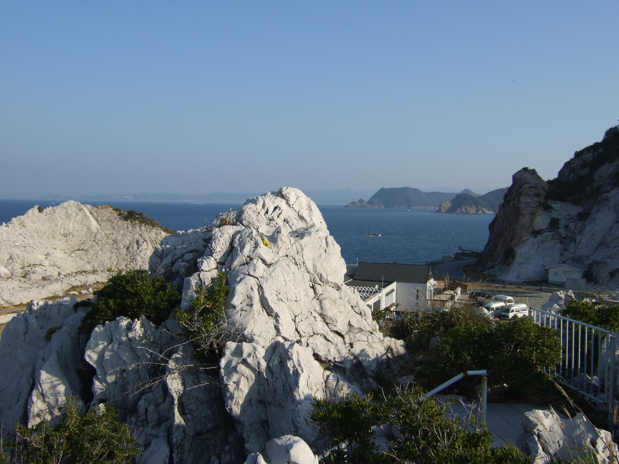 白崎海洋公園